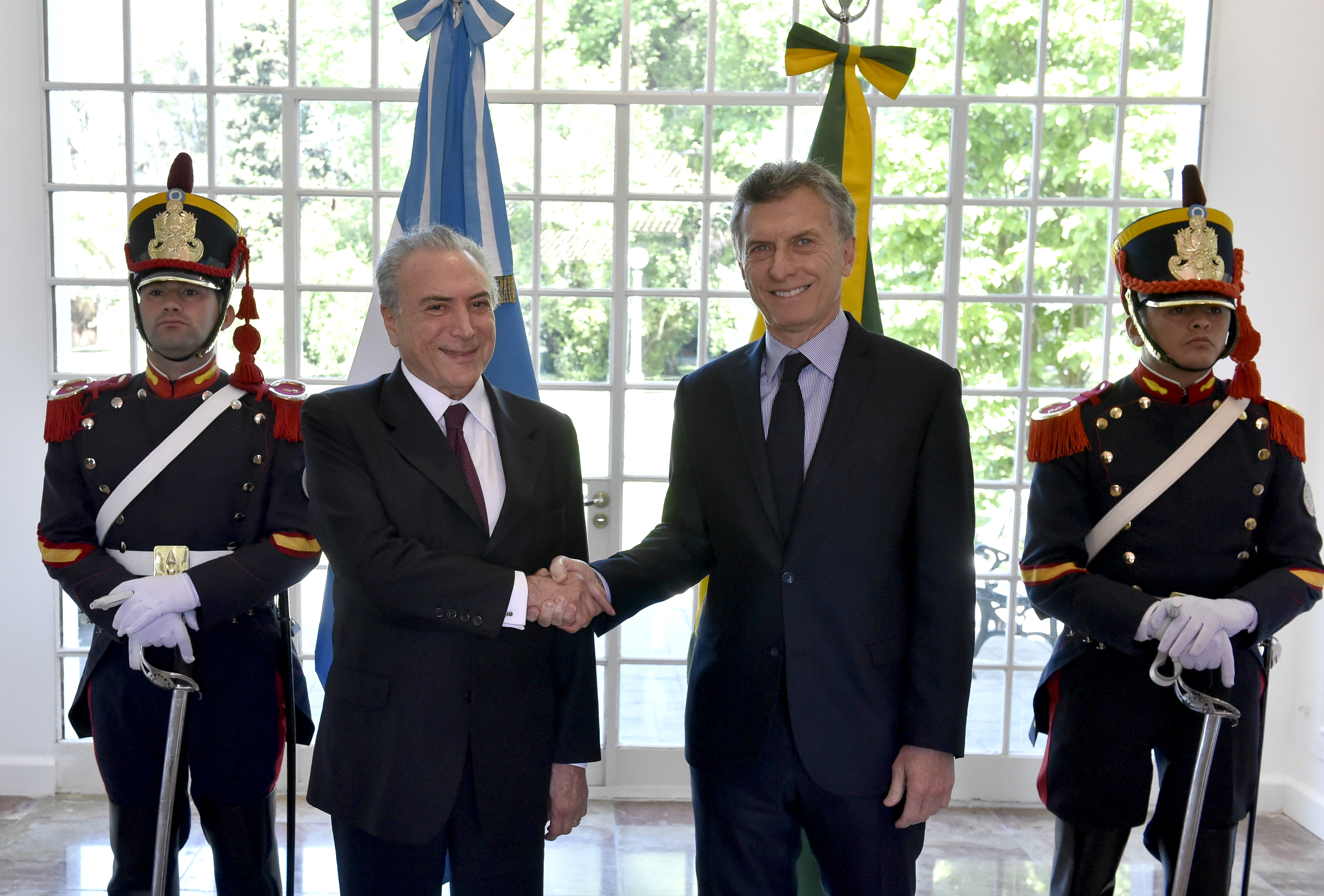 Los presidentes de la Argentina, Mauricio Macri, y de Brasil, Michel Temer, en la Residencia de Olivos.